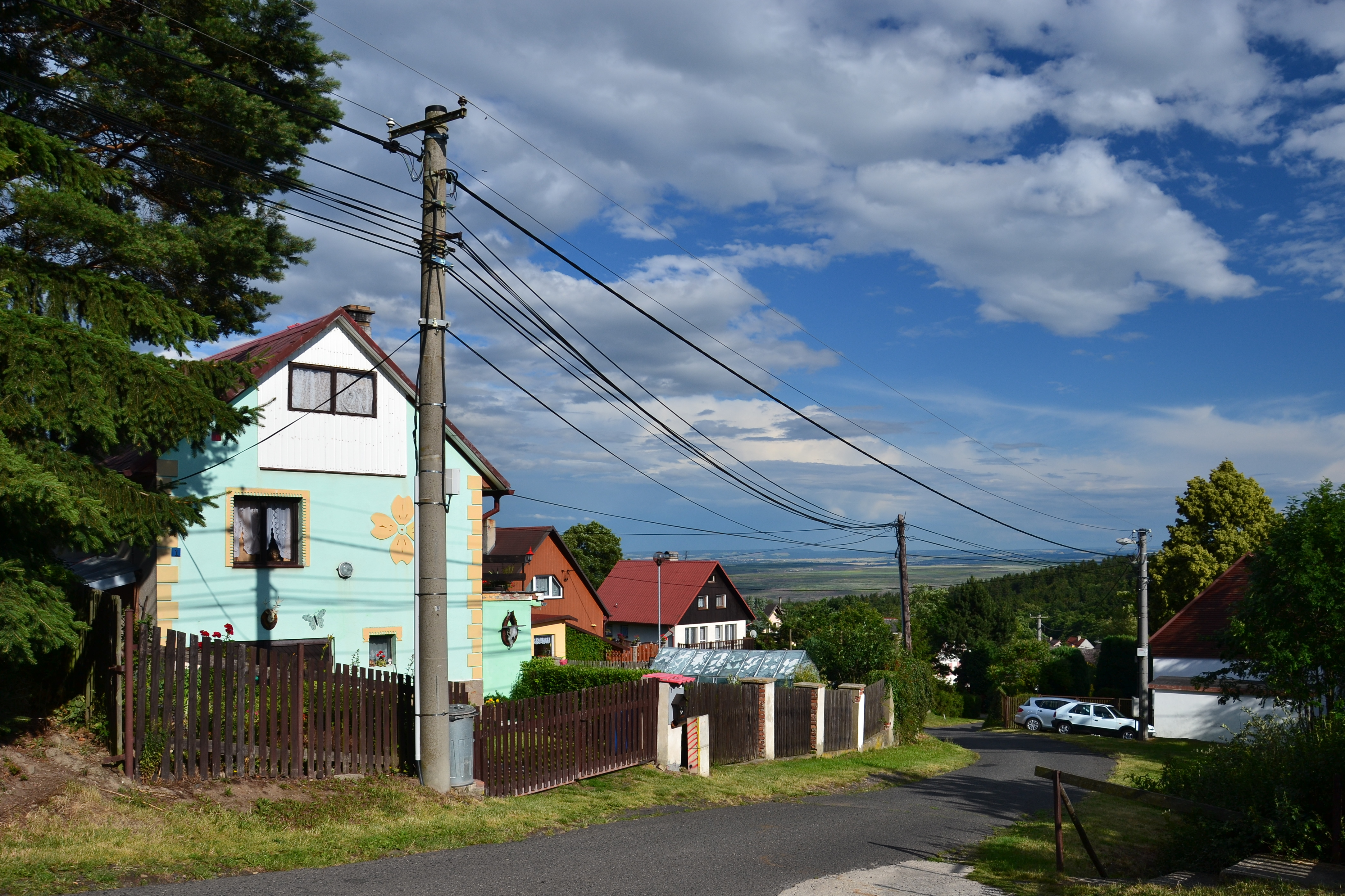 Blahuňov - střední část vesnice